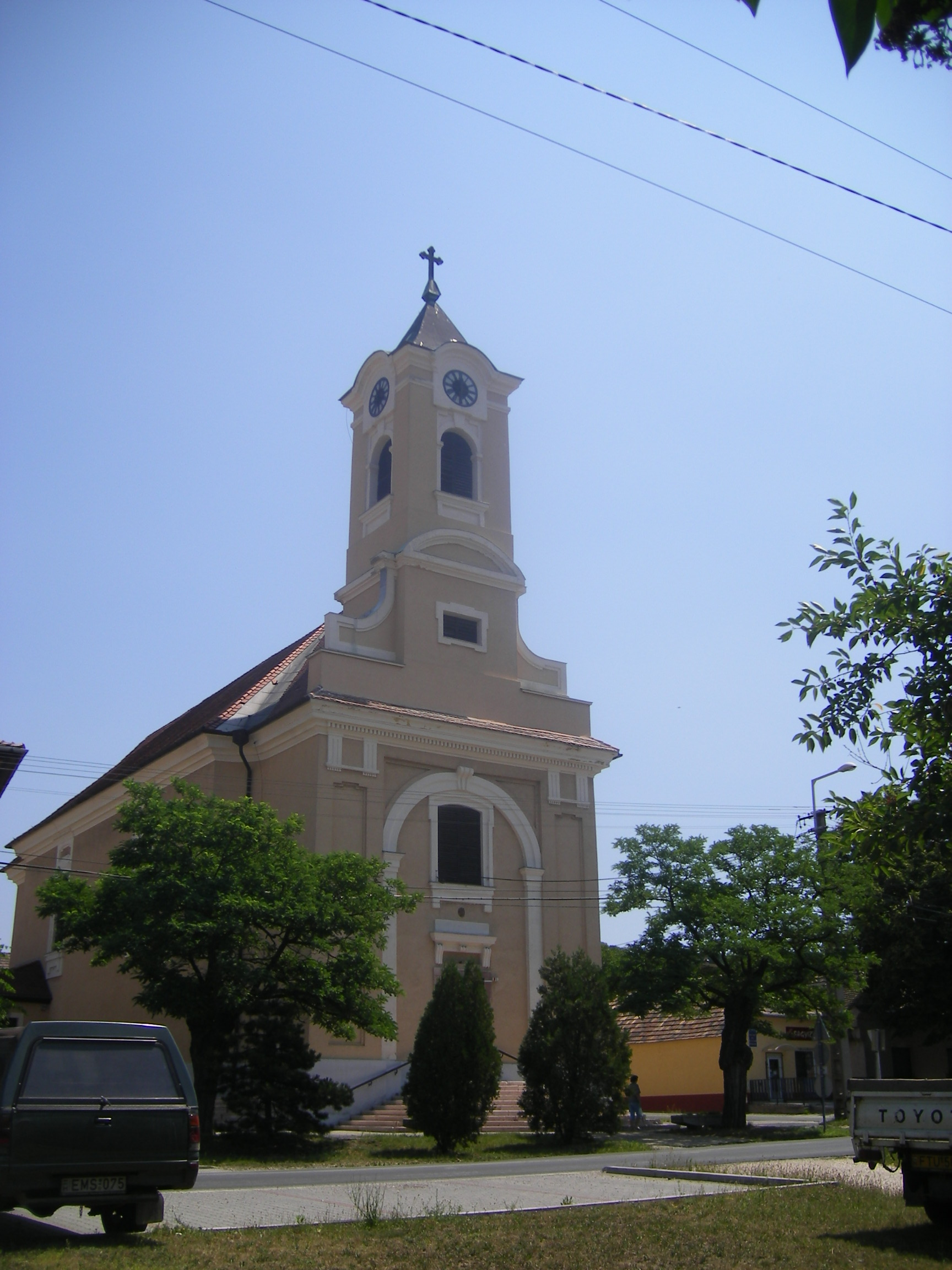 Felsőgalla, Szűz Mária neve római katolikus templom